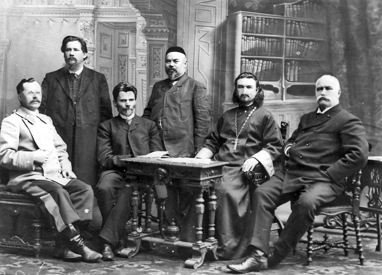 Группа депутатов Третьей Государственной думы от Оренбургской губернии (1907-1908): Сергей Шеметов, казак; Федор Владимиров, крестьянин; Наум Теребинский, частнопрактикующий врач; Зигангир Байбурин, лекарский помощник; Николай Балалаев, священник; Иван Покровский, горный инженер.